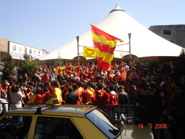 galatasaray Store-Taraftar